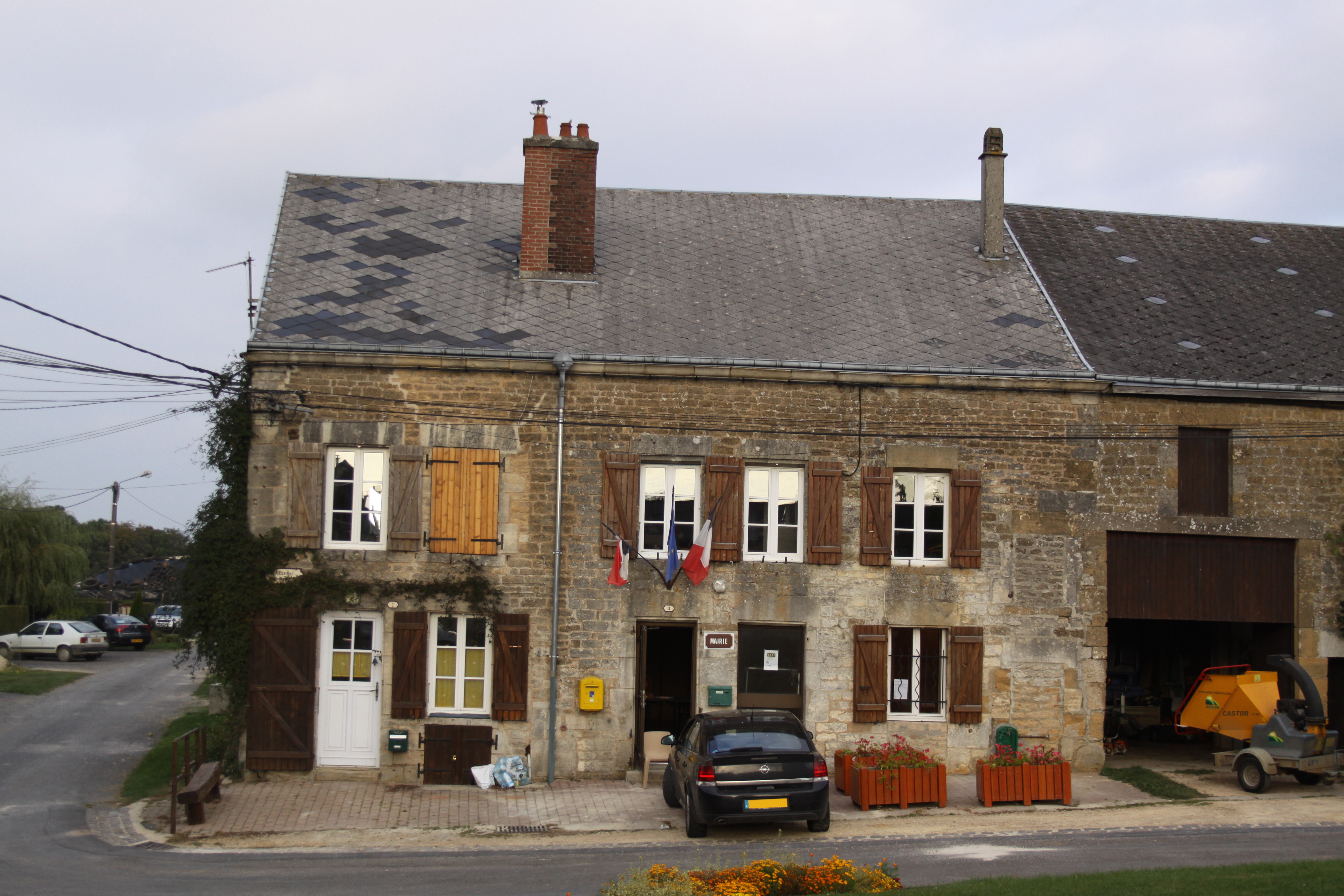 Village Ardennais